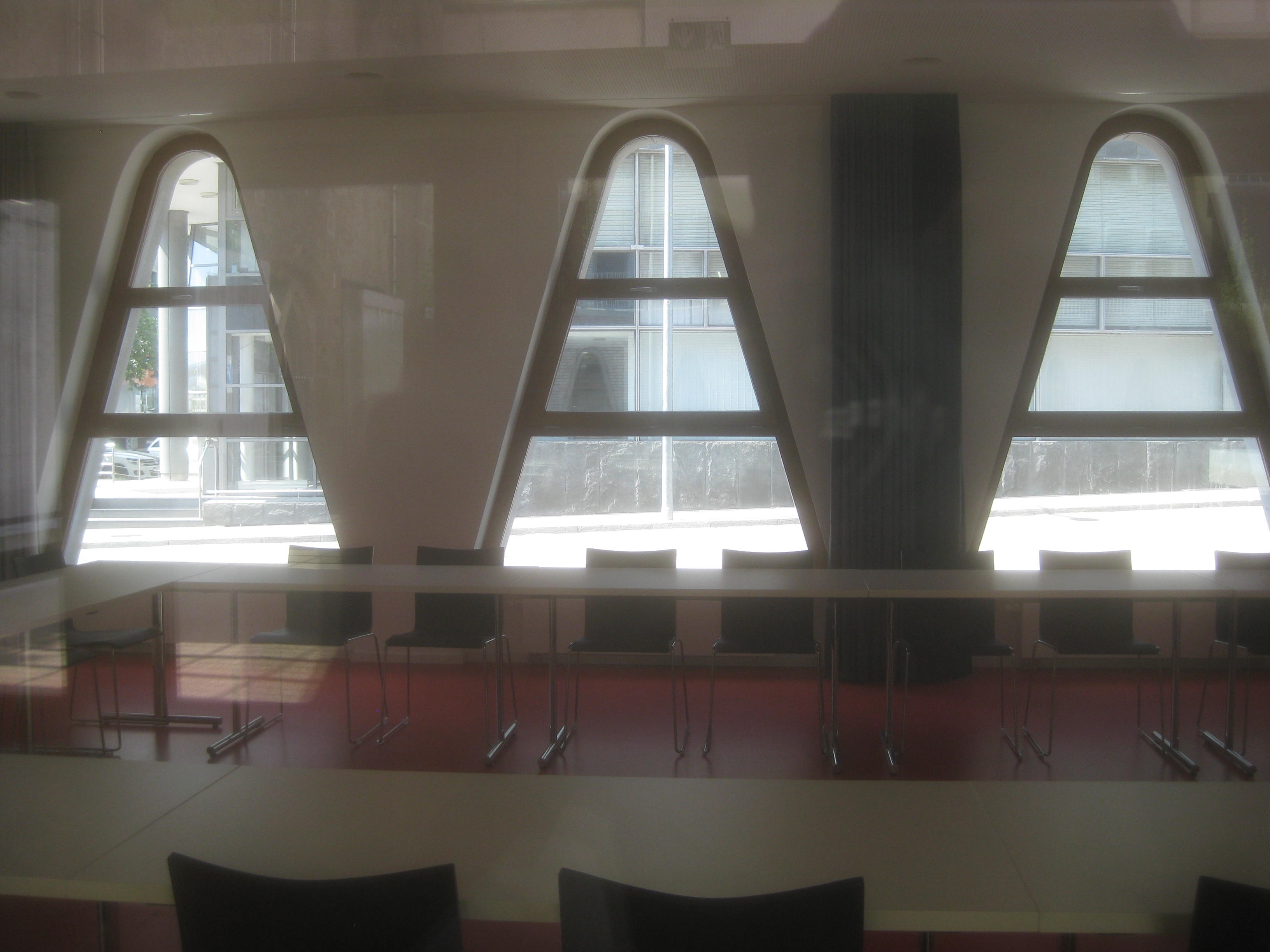 Hospitalhof in Stuttgart, Seminarraum an der Gymnasiumstraße.